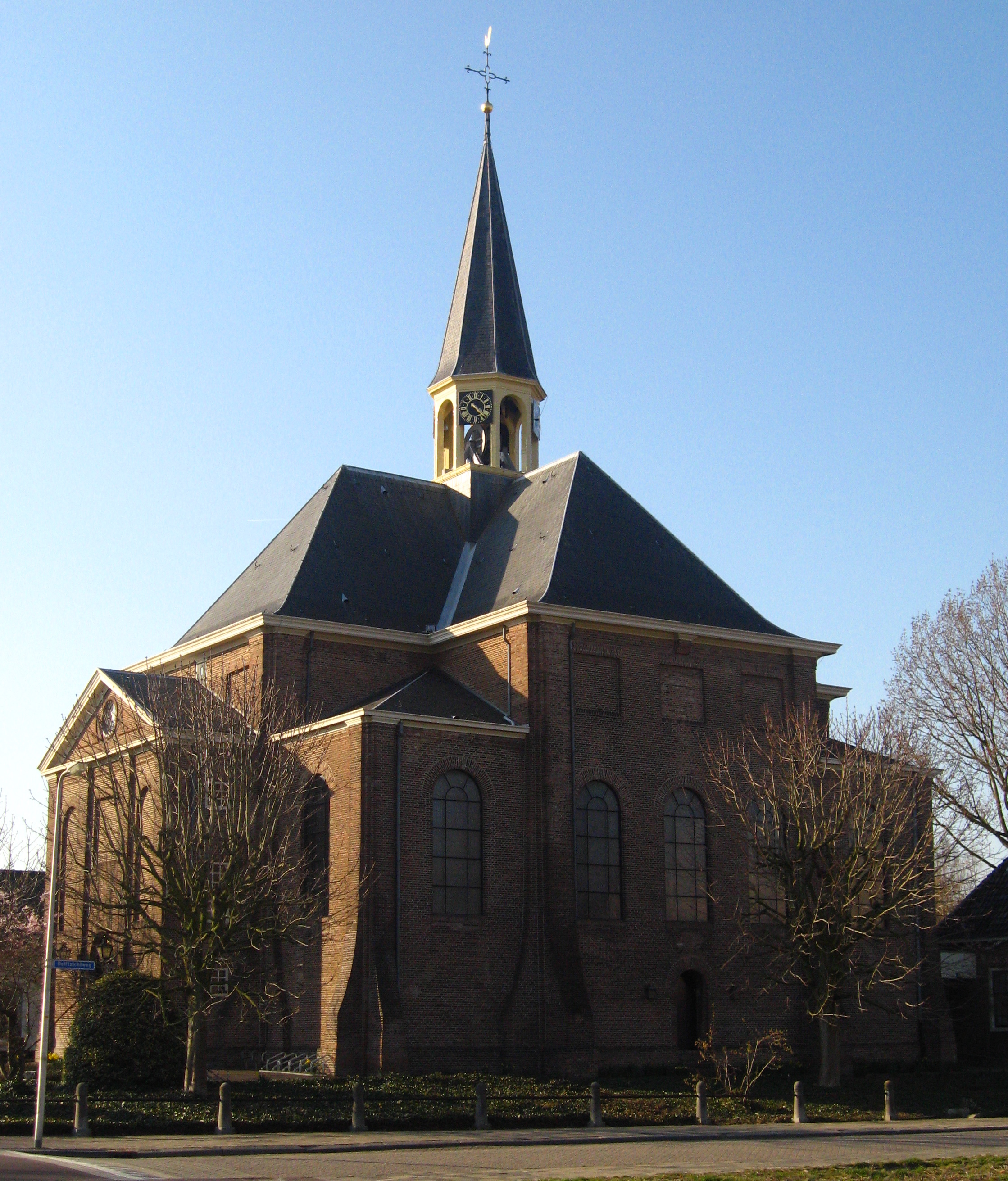 Oudshoornse Kerk Alphen aan den Rijn